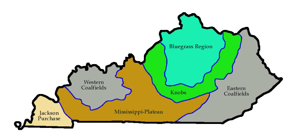 Physiographische Regionen Kentuckys.